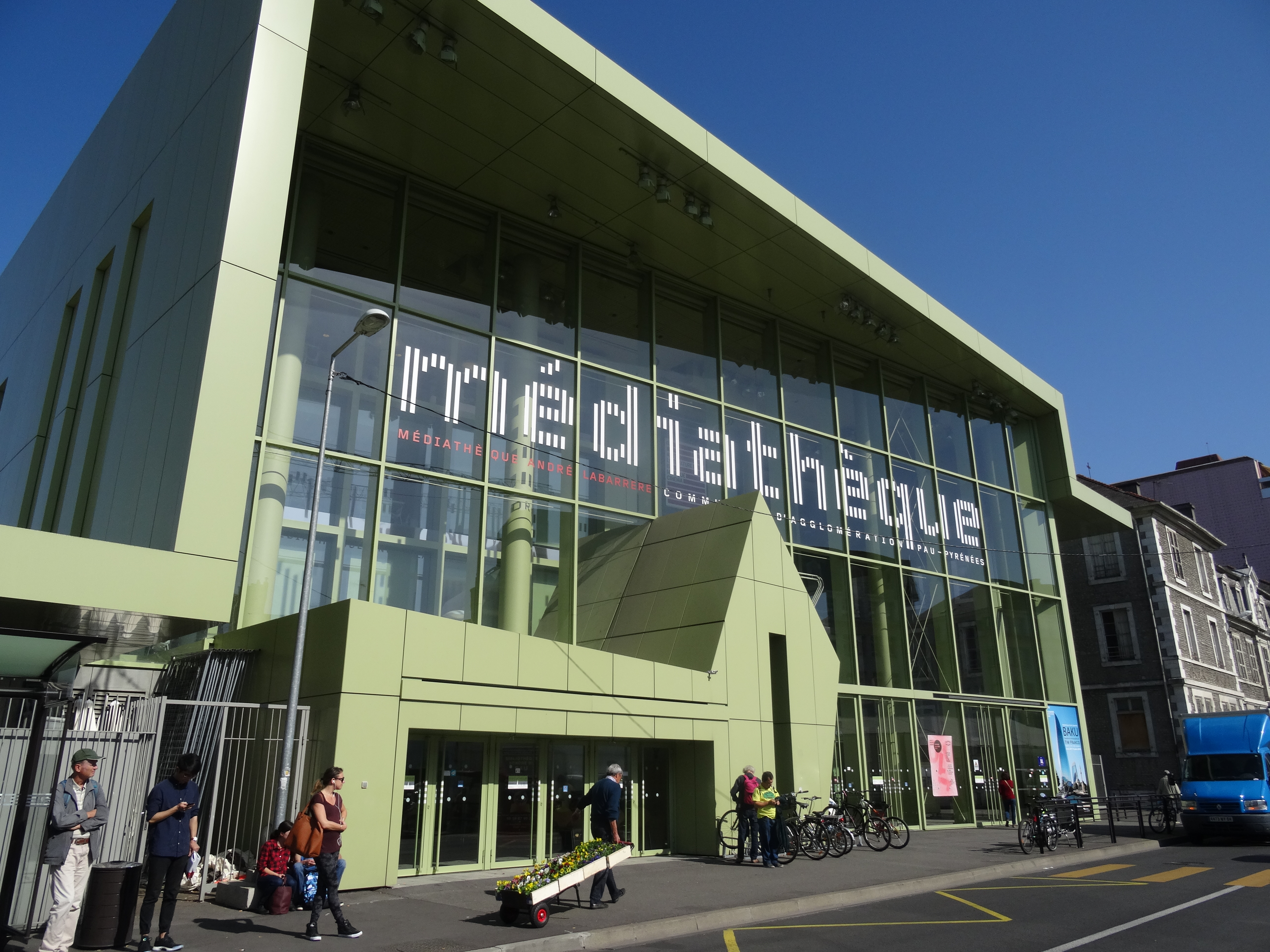 Médiathèque André Labarrère de Pau